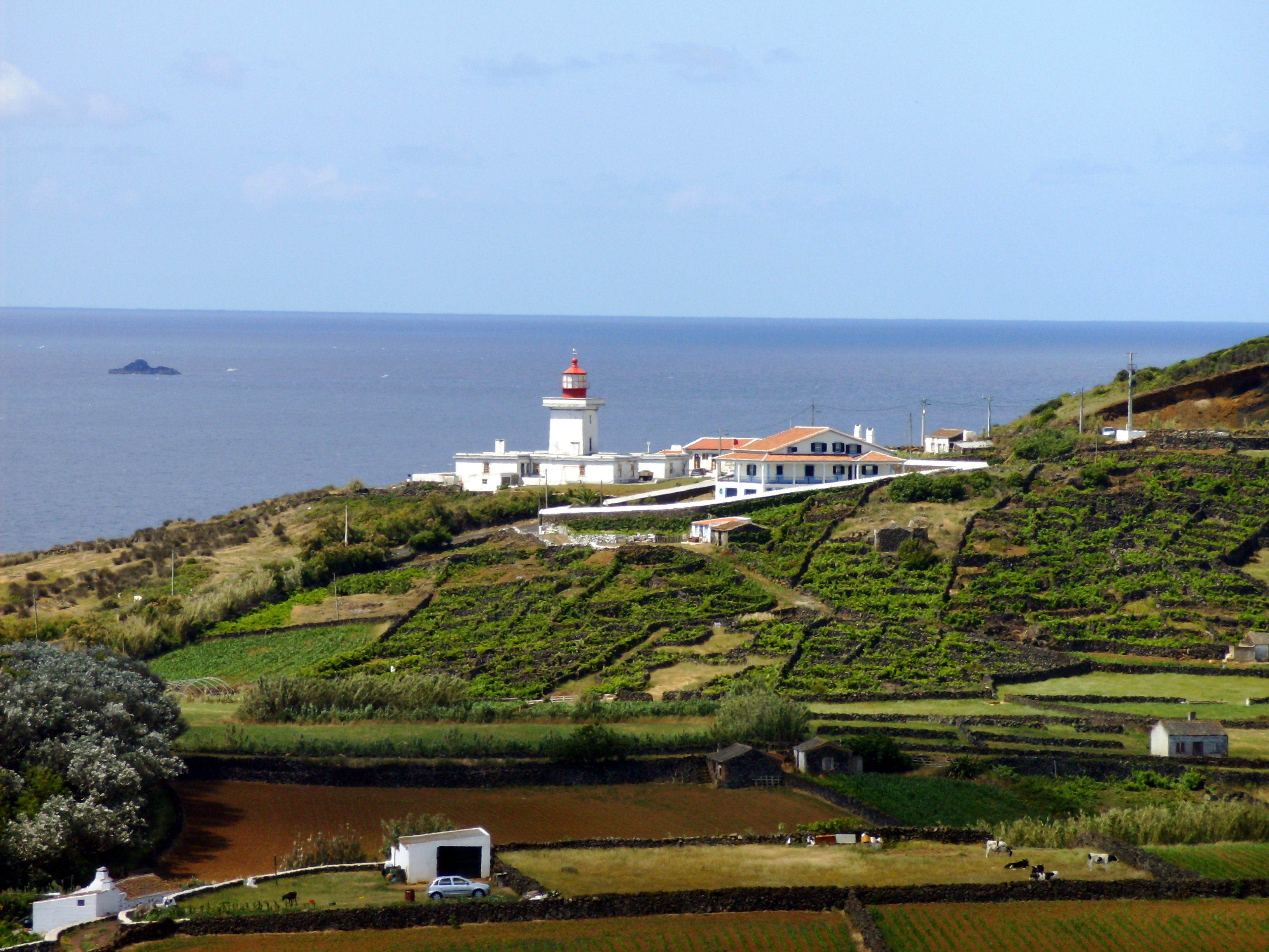 Farol da Ponta das Contendas, Ilha Terceira, Açores.